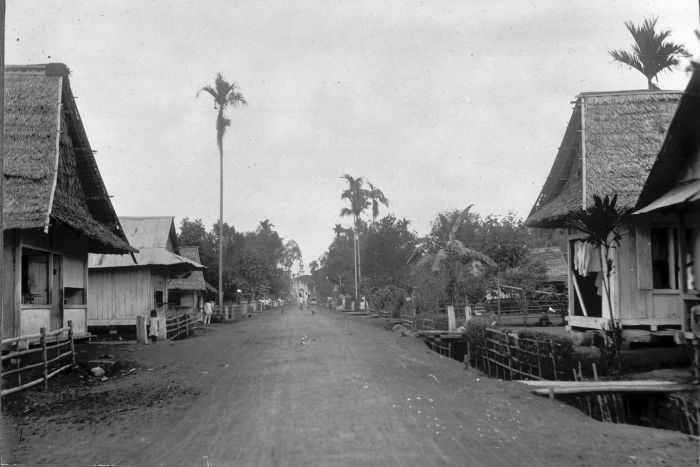 Foto. Straat te Langowan.